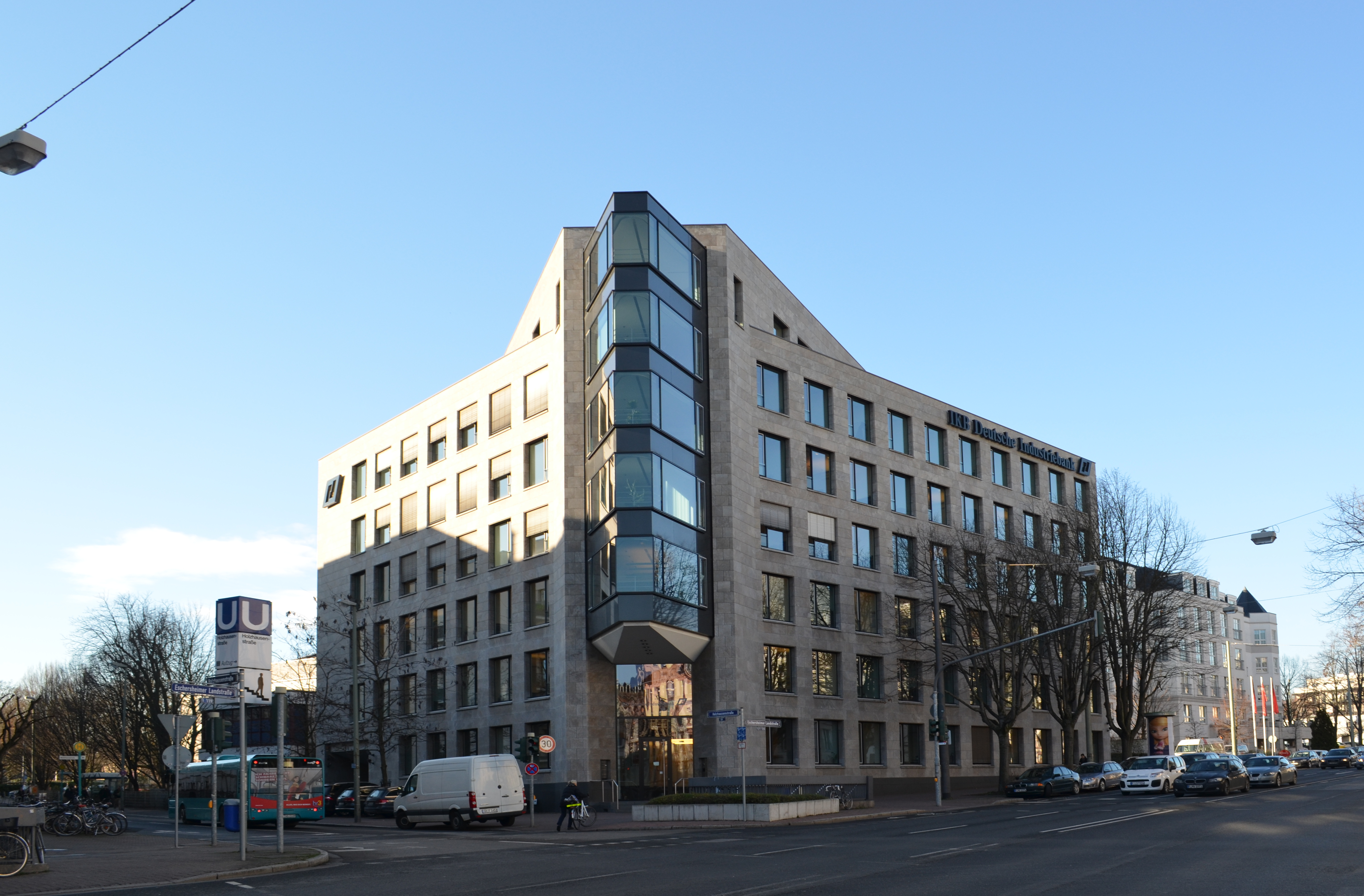 Frankfurt, IKB